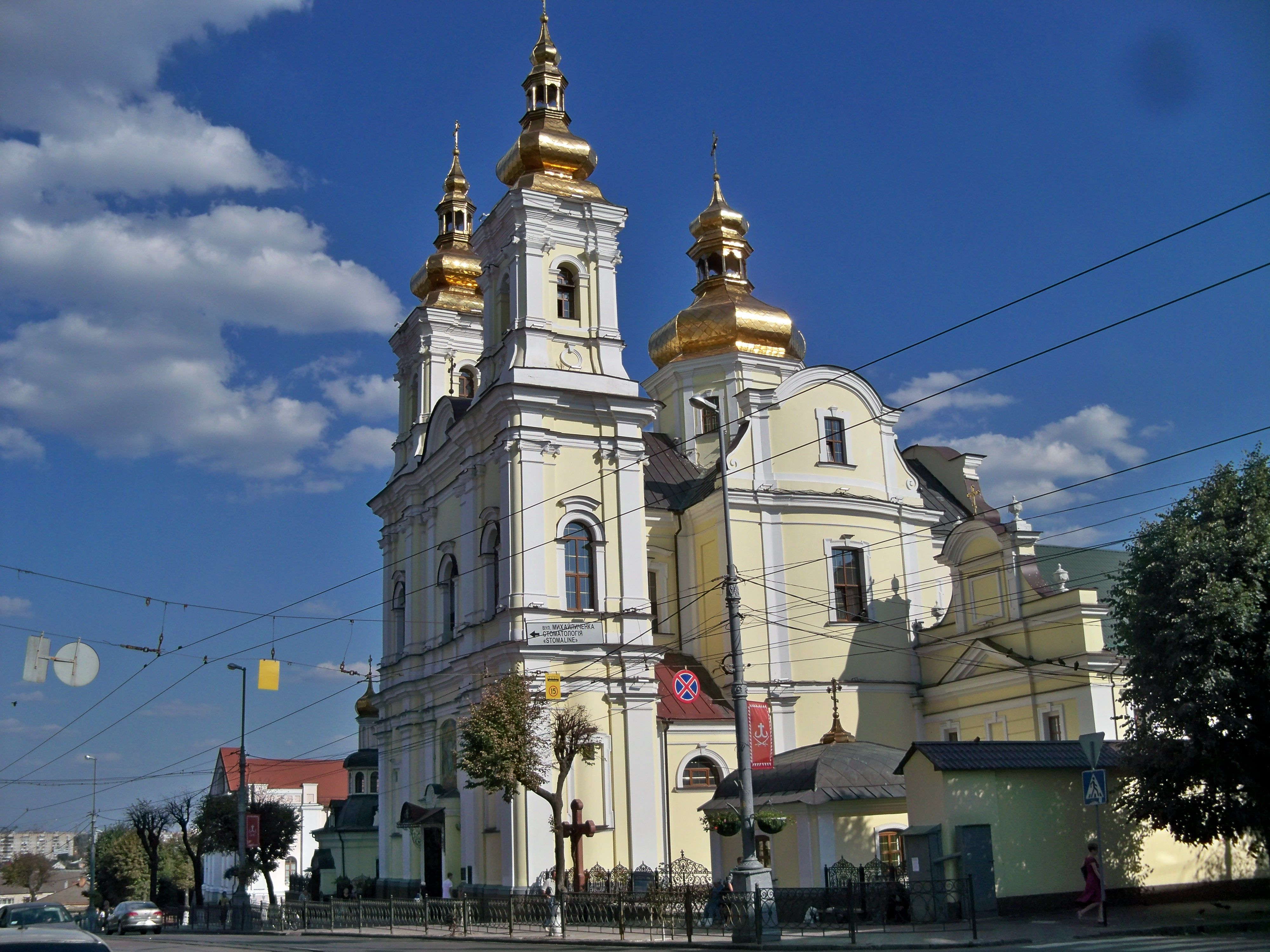 Монастир домініканців, Вінниця, вул. Соборна, 21